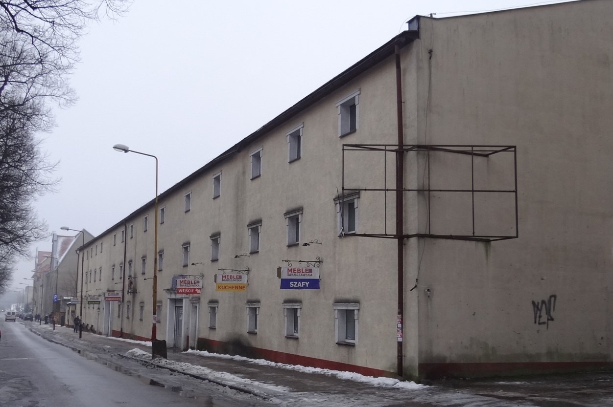 Garnizon Stargard 1914/2016 r. Były budynek niemieckich magazynów wojskowych (depotu), obecnie sklep meblowy